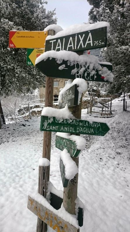 Indicador en el cruce de caminos de Talaixà. Invierno 2017.